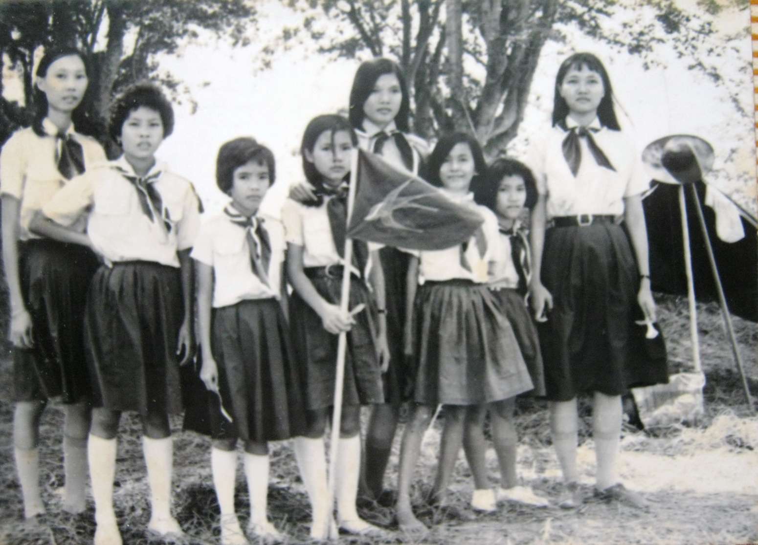 Một nhóm hướng đạo sinh nữ tại Long Xuyên (An Giang, Việt Nam) năm 1965. (Ảnh chụp lại từ album của gia đình)